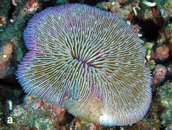 Fungia fungites, en Pulau Layang-Layang, islas Spratly, 2013.